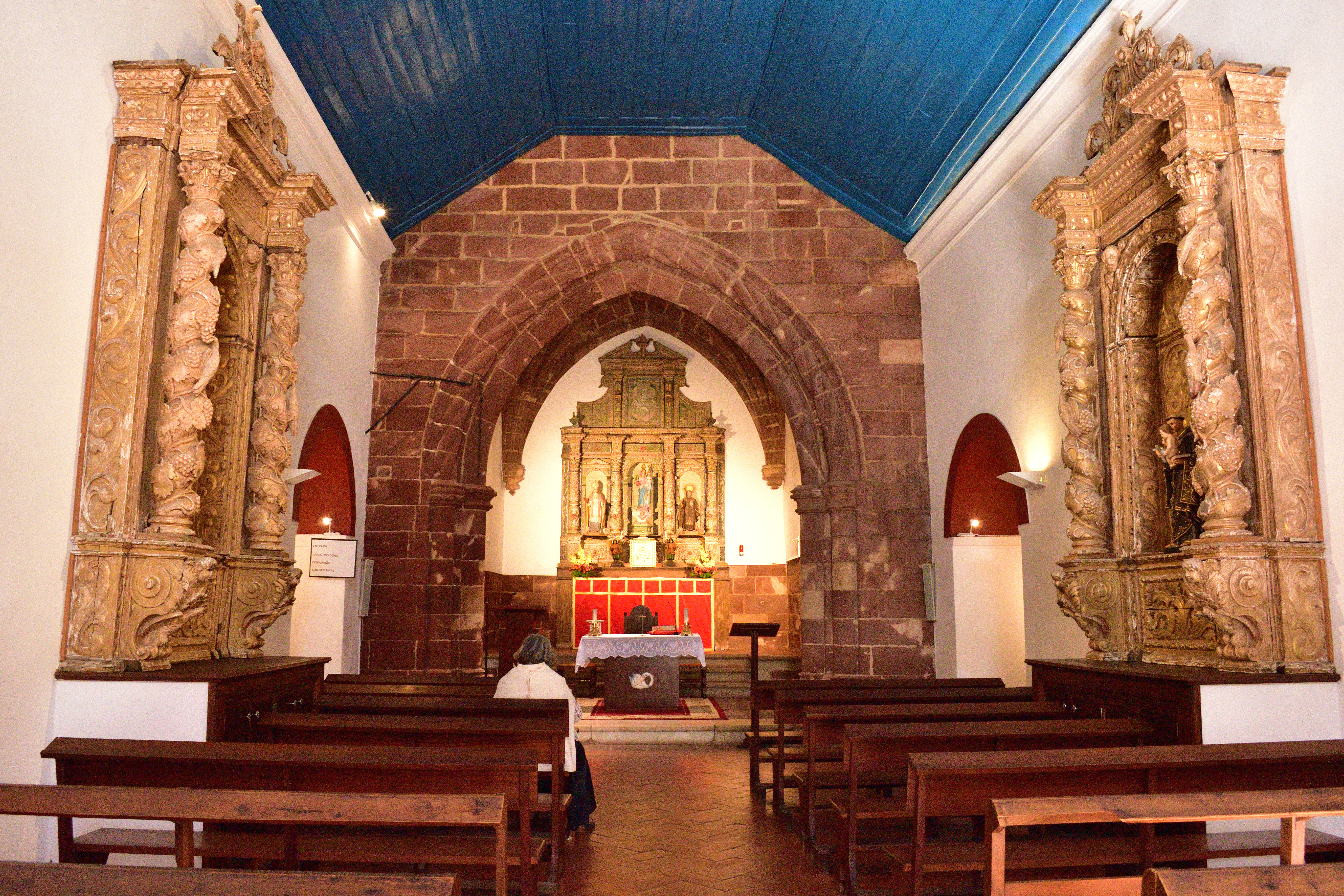 Interior da Ermida de Nossa Senhora dos Mártires, na cidade de Silves, em Portugal.